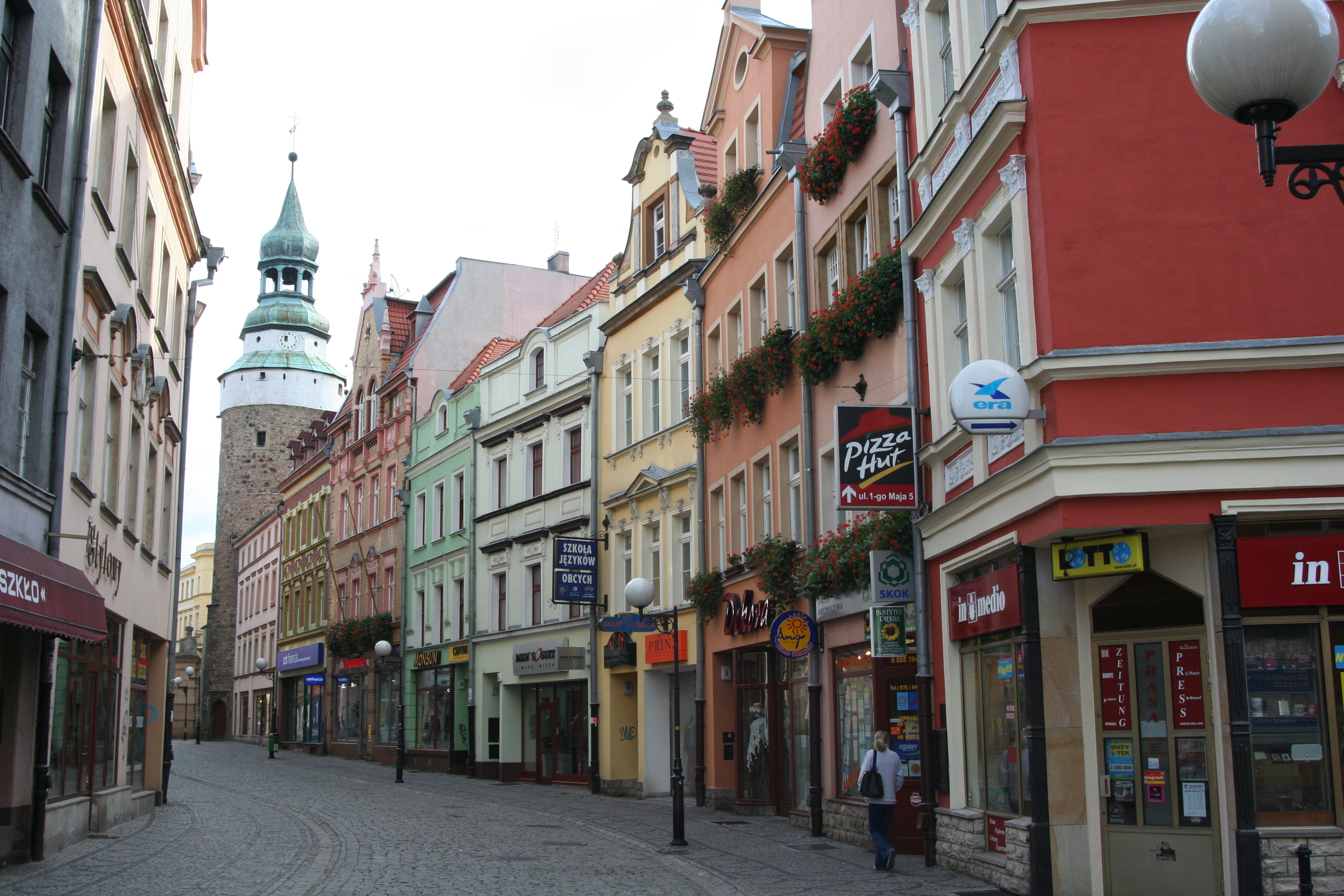 Maria Konopnicka Street (Polish ulica Marii Konopnickiej)in Jelenia Gora, Poland.